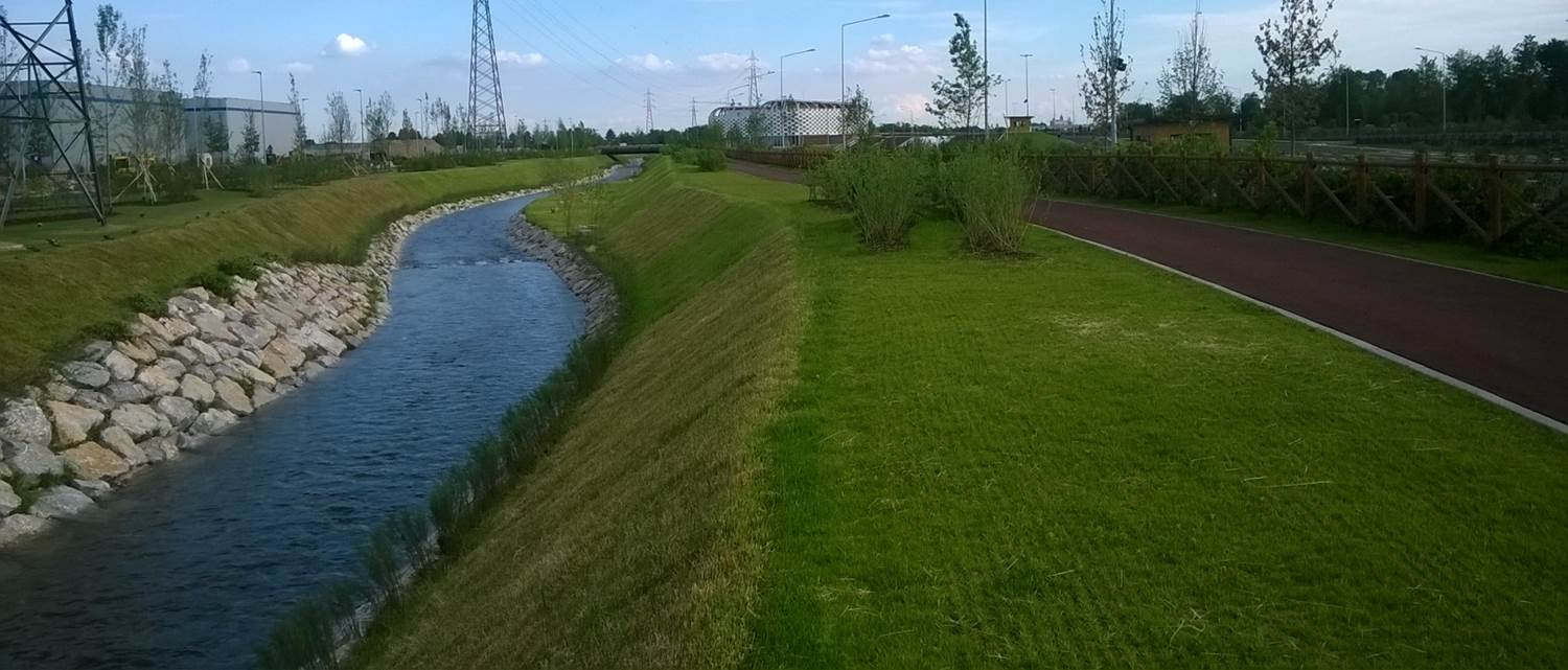 Area Ex Alfa Romeo